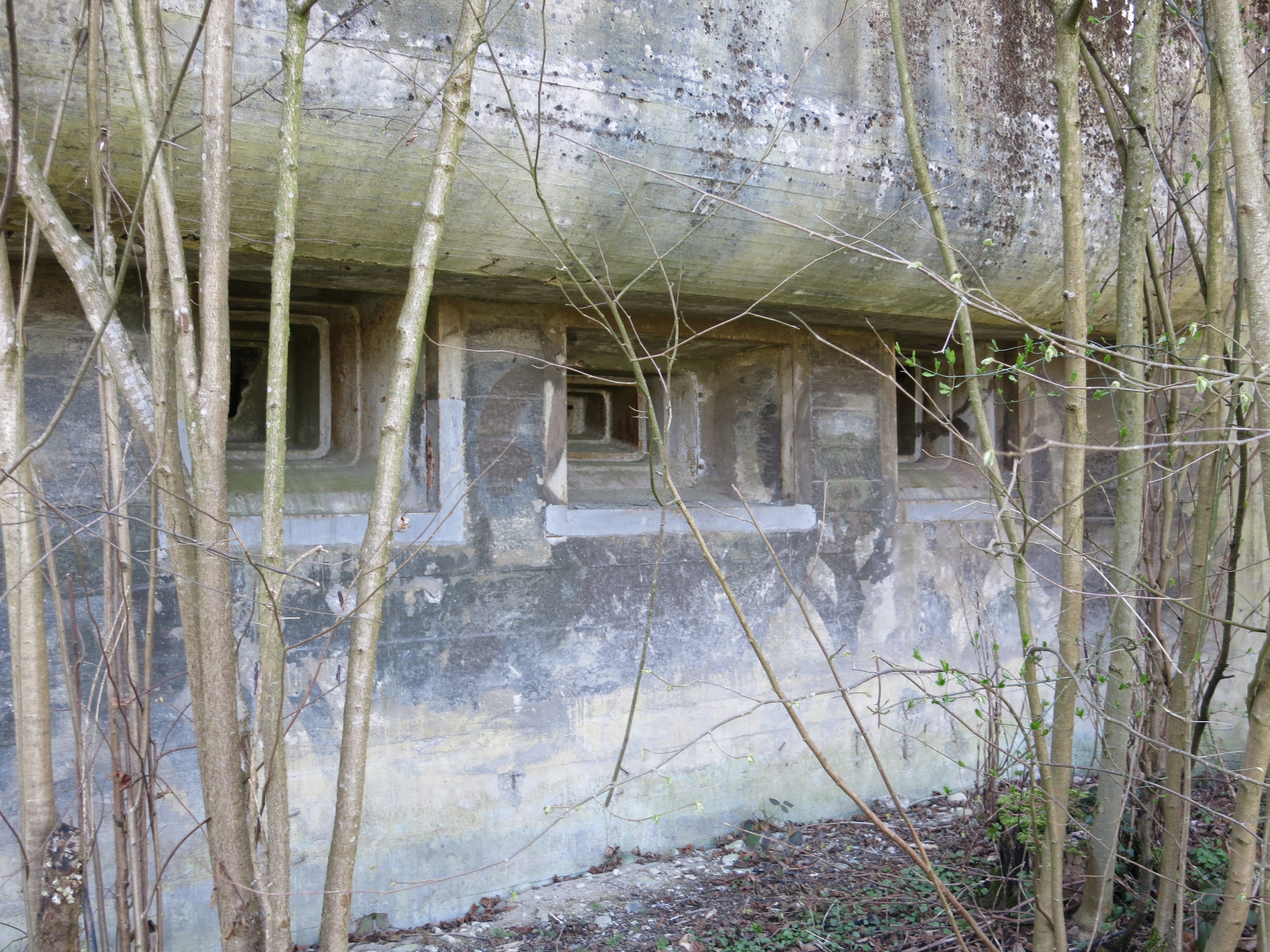 Sperrstelle Urdorf ZH, Schweiz: A 5210